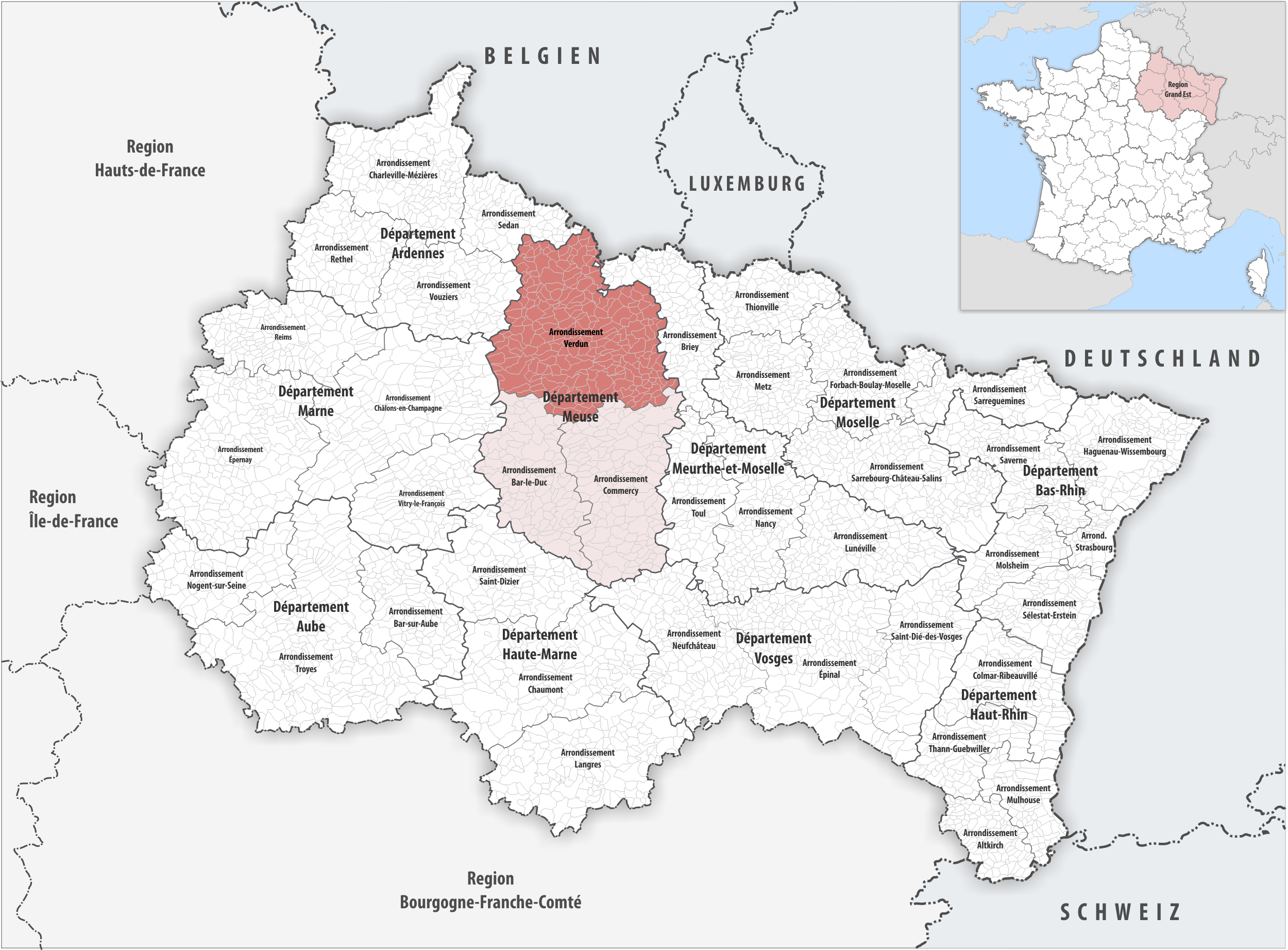 Lage des Arrondissements Verdun